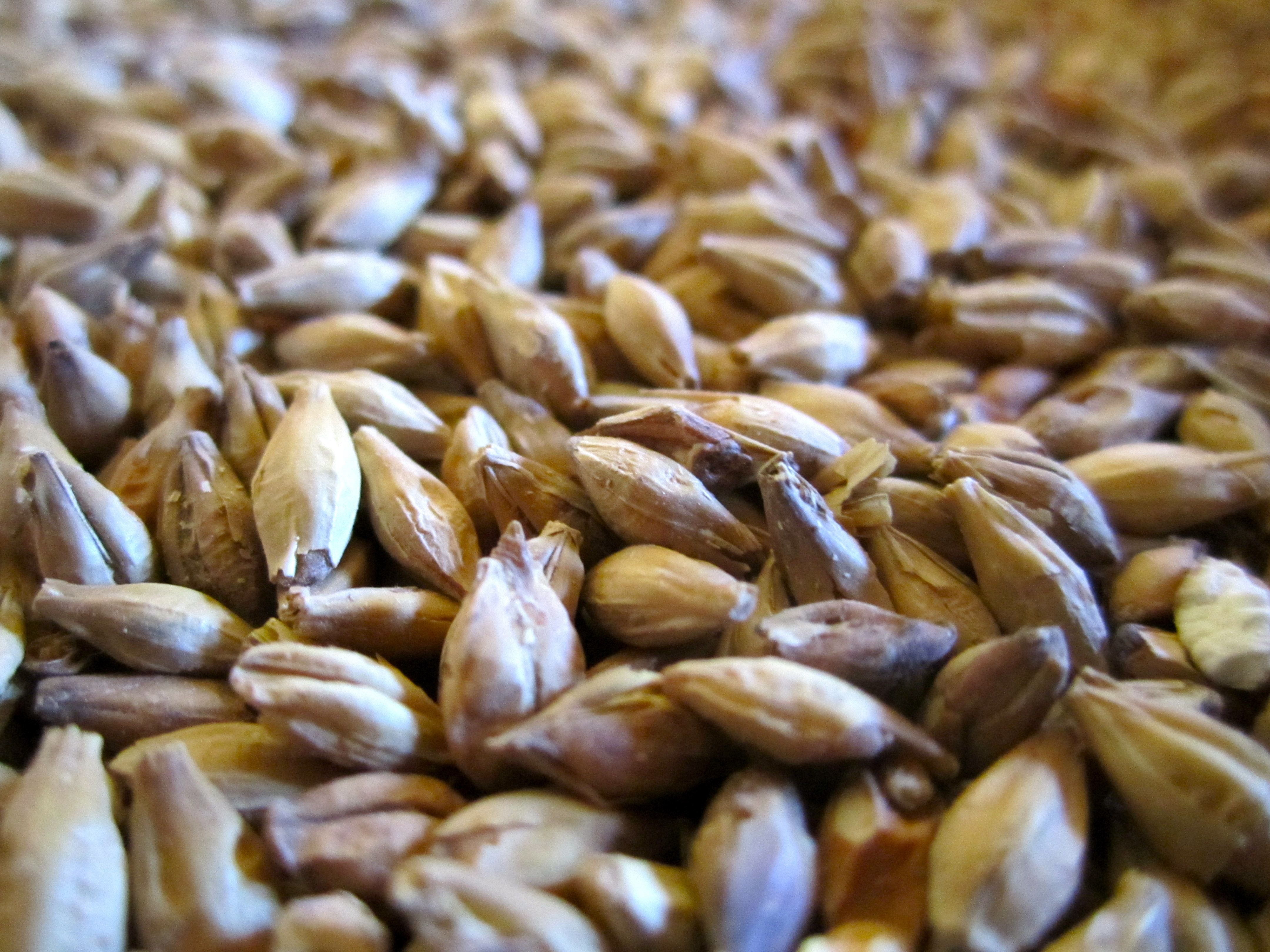 Brassage amateur de bière